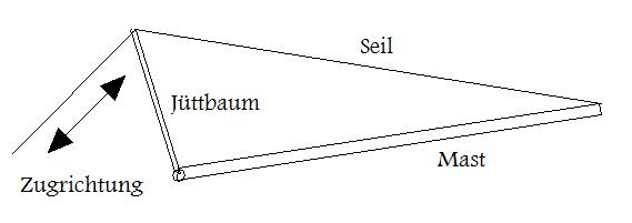 Funktionsweise eines Jüttbaums (Skizze)